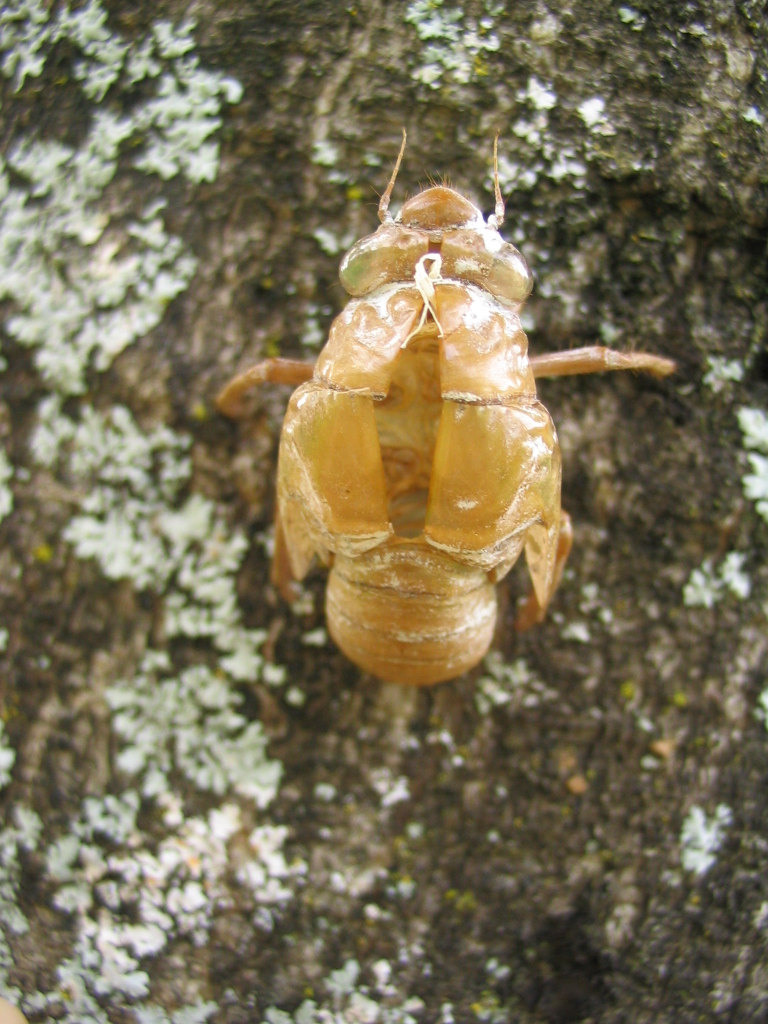 Exúvia de cigarra da família Cicadidae. Cicadidae skin